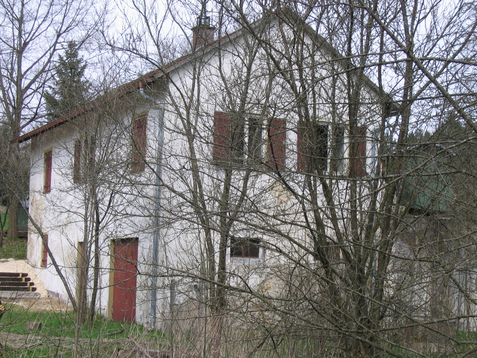 Ein Restgebäude von dem einstigen Forsthof